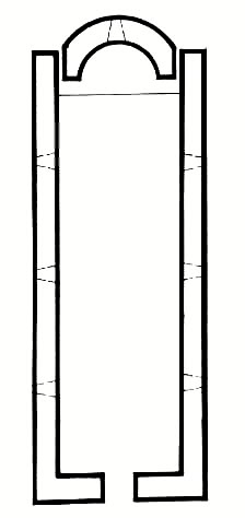 Mingəçevir Kilsə kompleksində bir nömrəli məbədin planı